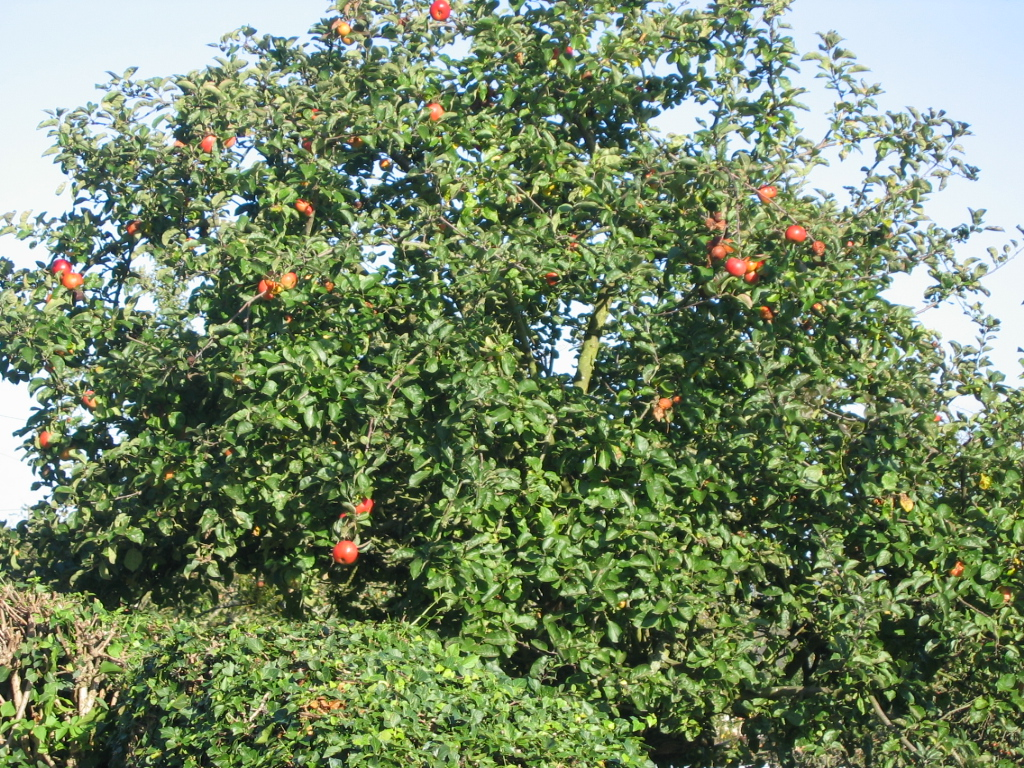 Pommier / Photographie personnelle prise en octobre 2004, dans le Marais-Vernier, Haute-Normandie / GFDL